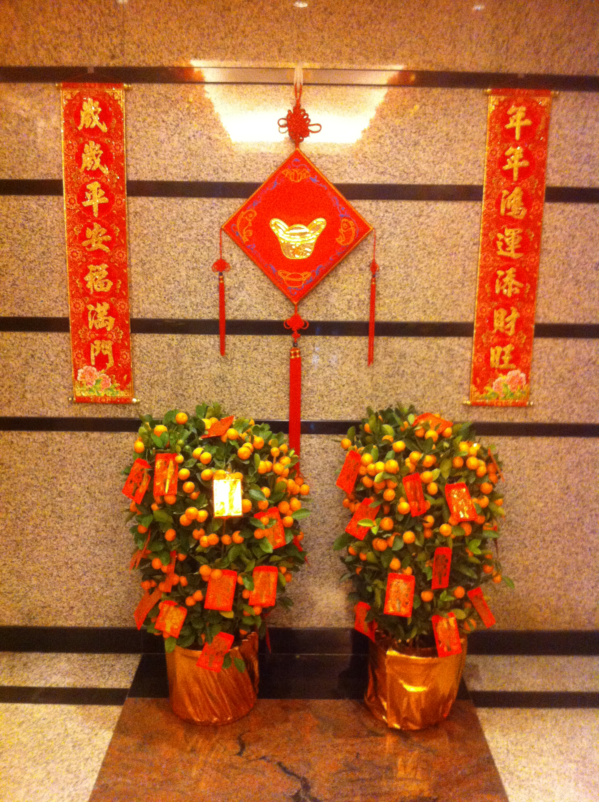 中文（香港）: 香港島干德道42號 匯豪閣